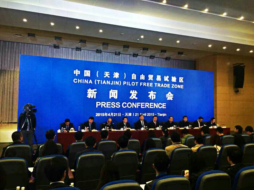 天津自贸区新闻发布会2015-04-21